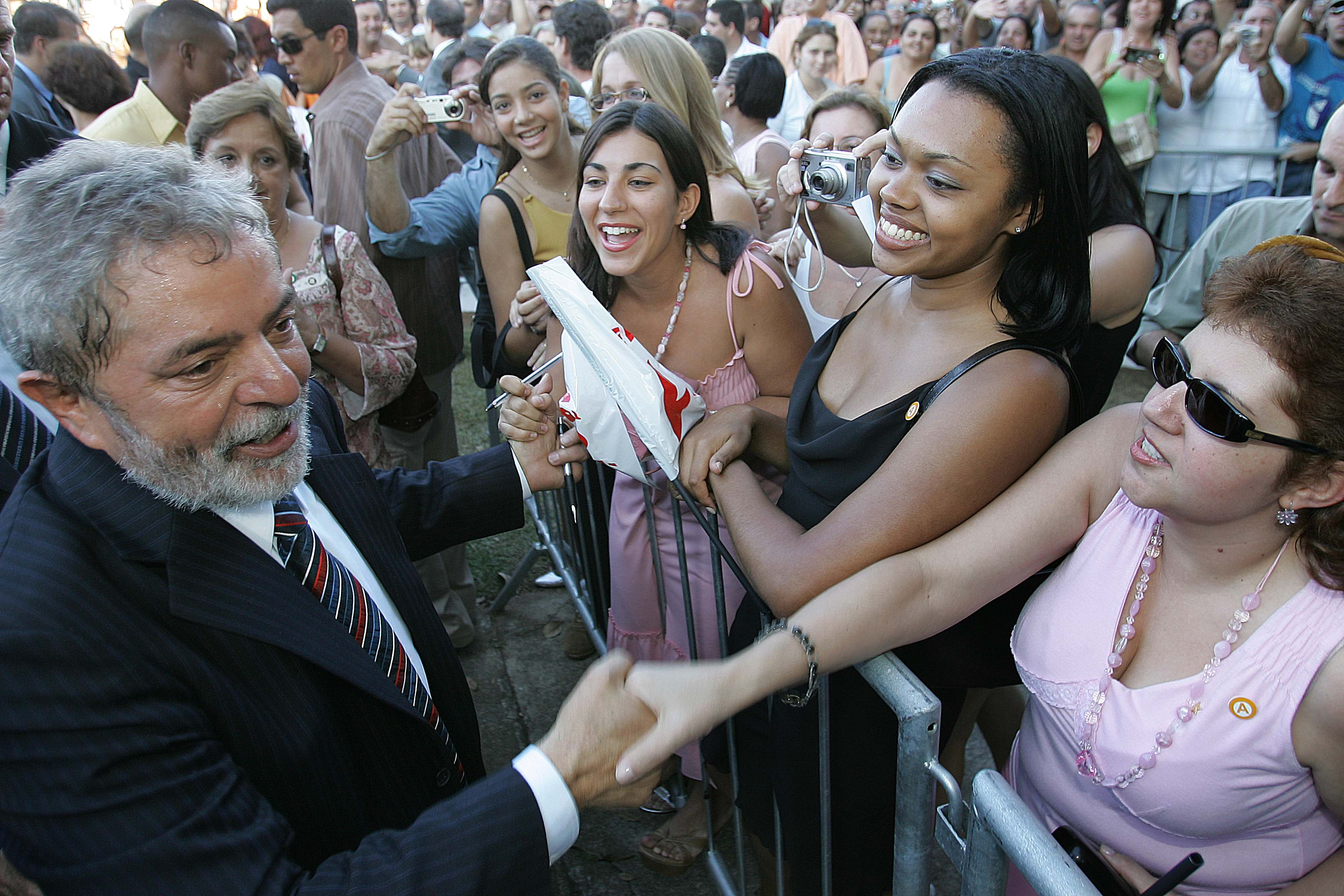 Sorocaba (SP) - Presidente lula cumprimenta populares no município de Salto, onde visitou as futuras instalações do Cefet e participou da cerimônia de assinatura de termo de compromisso e cessão de seis escolas profissionalizantes comunitárias paulistas para o governo federal.